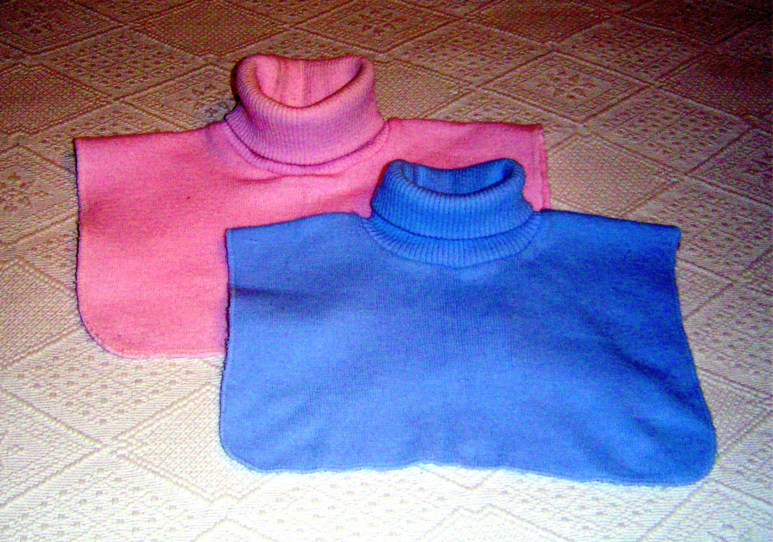 Photos de deux plastrons (col roulé)